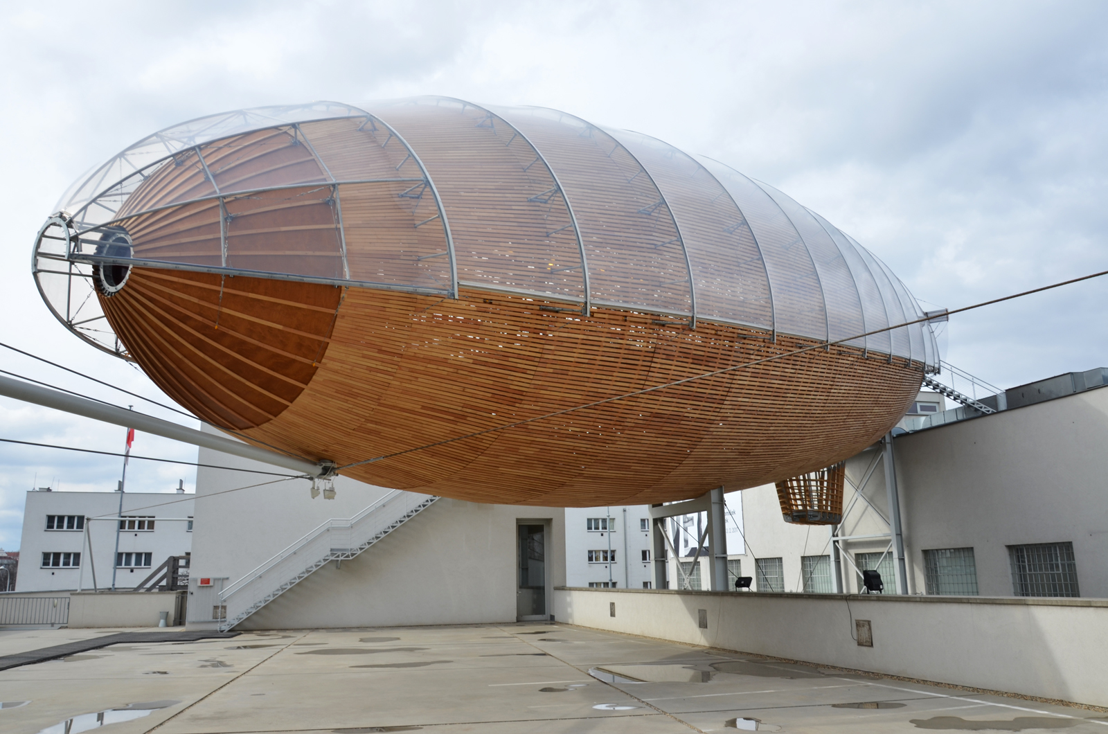 Vzducholoď Gulliver (2017), foto Jindřich Nosek